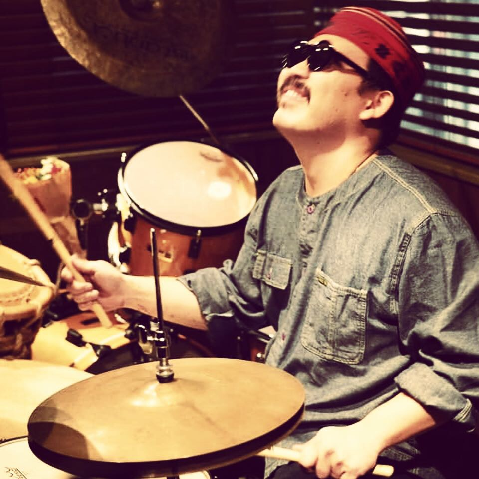 10/21/2018 御木惇史「雨と山」Release Party at Tokyo,Japan